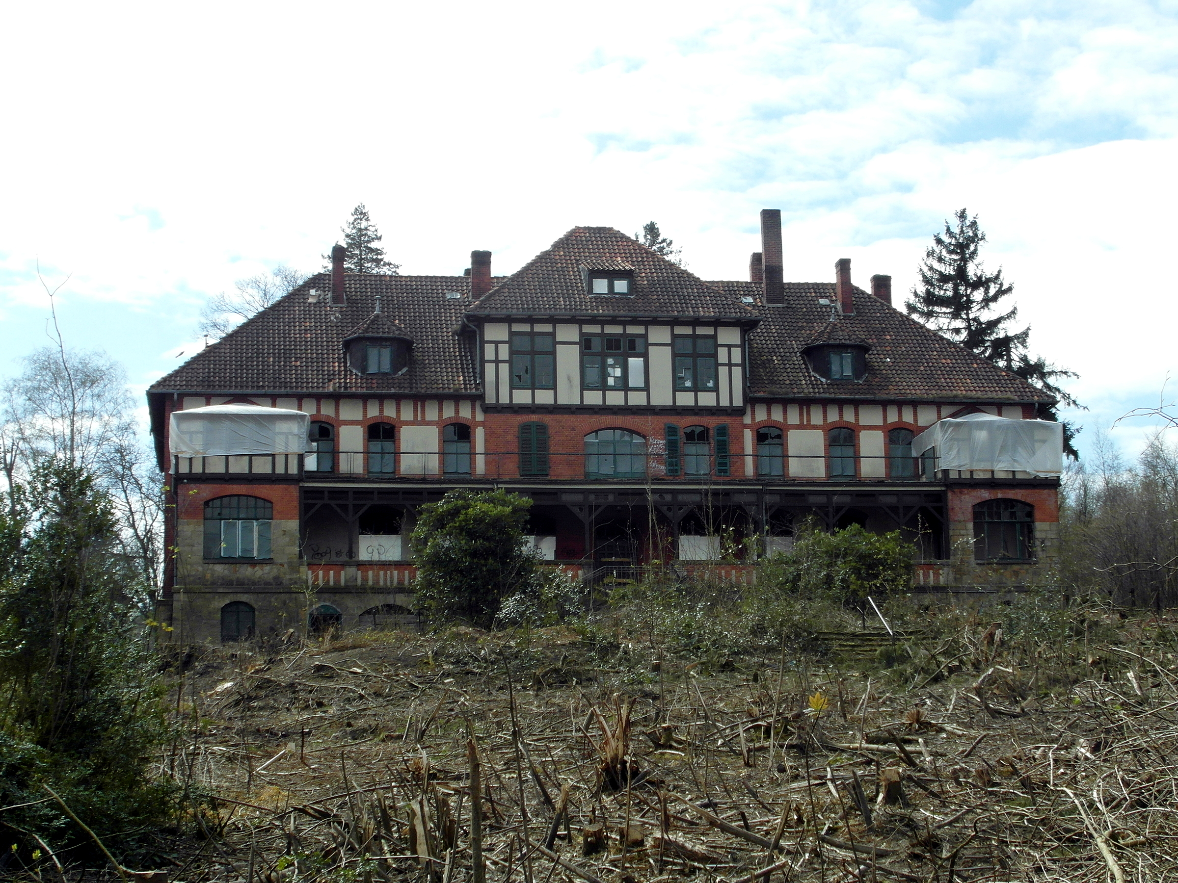 Anna-Forcke-Stift und bereits abgeholztes Grundstück. Aufgenommen von der Bergstraße in Barsinghausen.